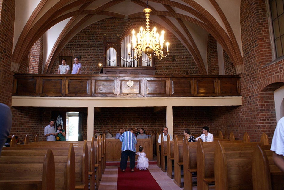 Kościół św. Krzysztofa pl. św. Krzysztofa 1, Miasto Wrocław - Stare Miasto